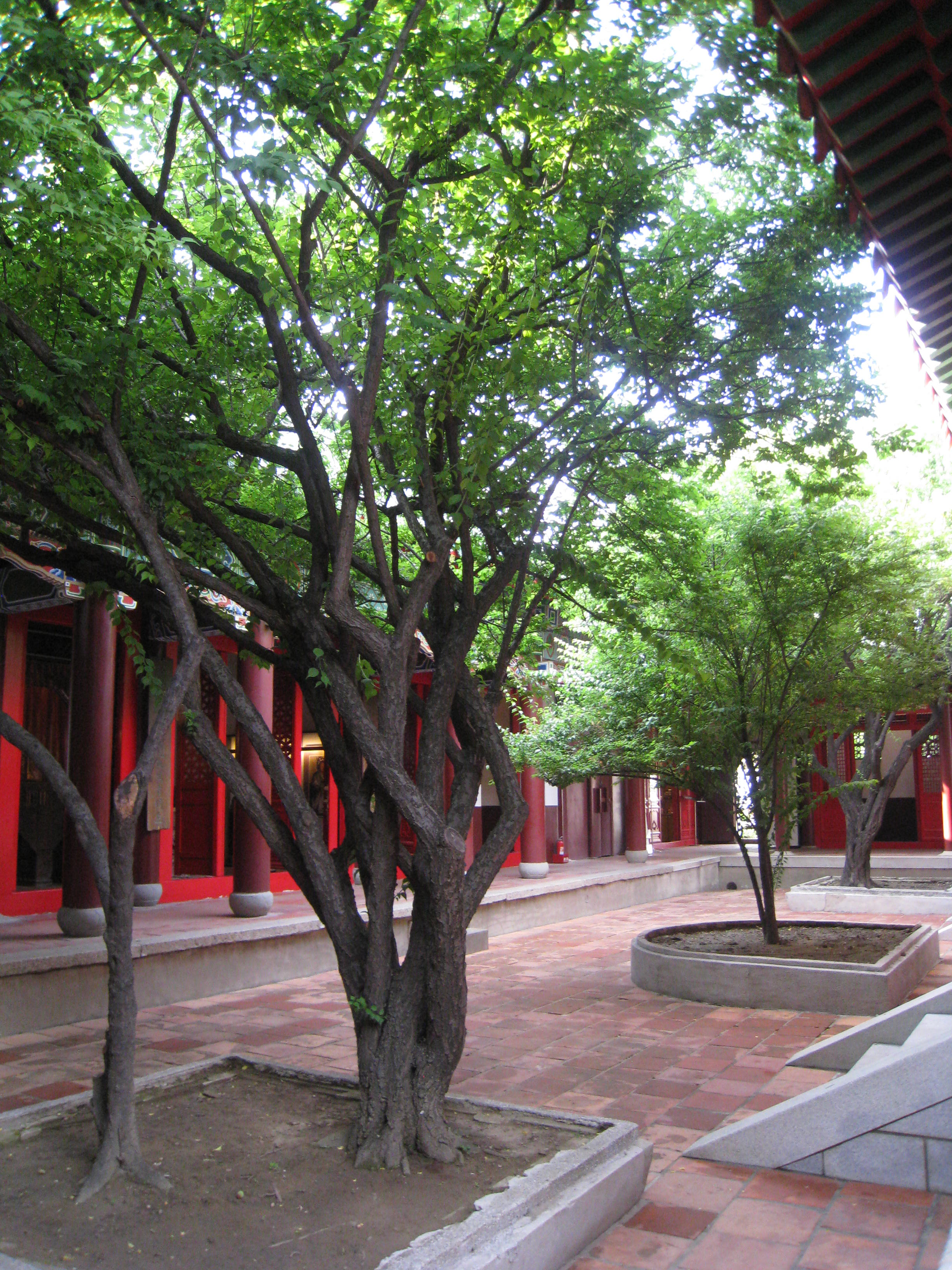 延平郡王祠梅樹，位於正殿後方，照片中為南側梅樹，據聞為鄭成功手植，並有書法家朱玖瑩題字敘明移植始末，崁於正殿背後牆壁，現況北側亦種有梅樹一株。